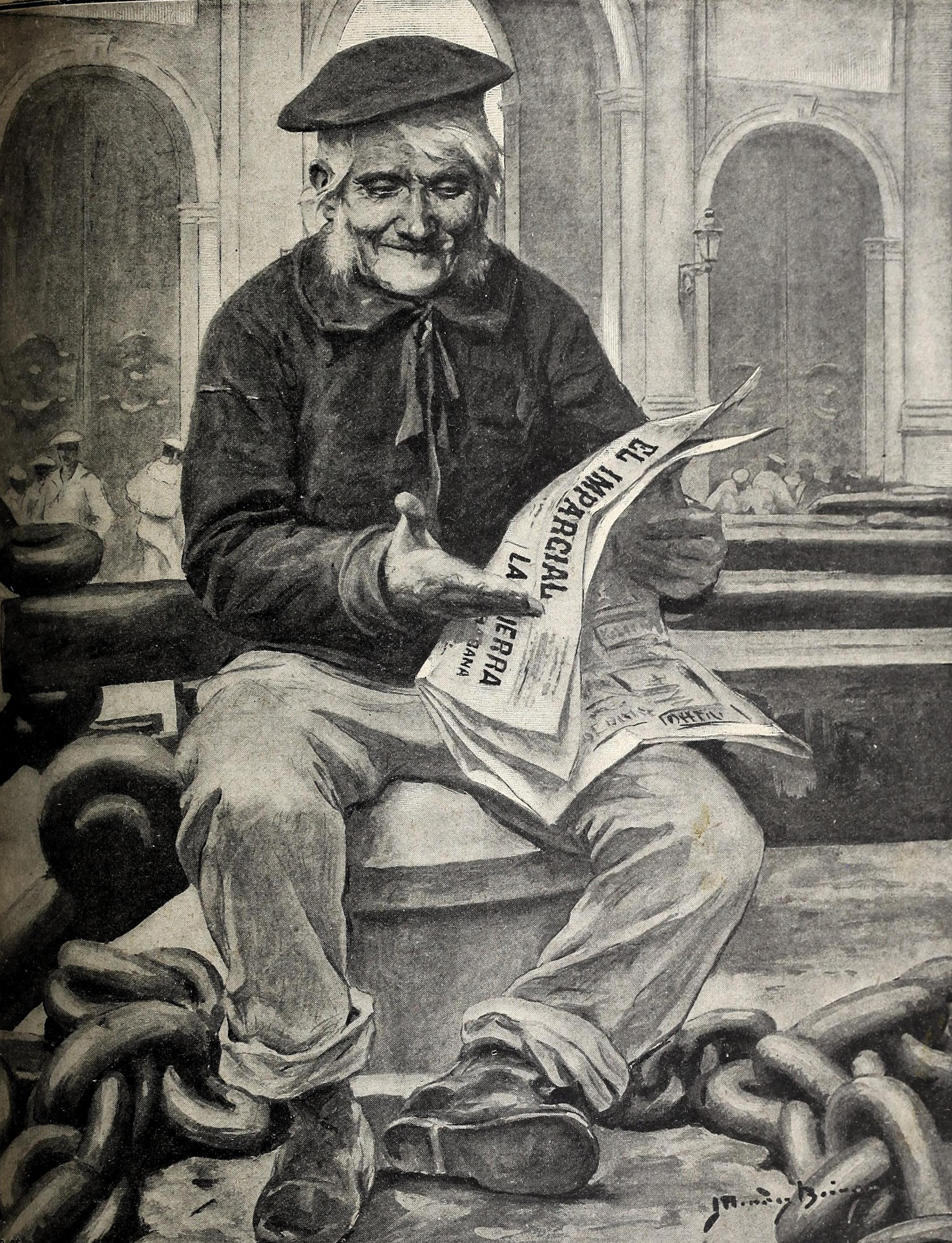 Portada de Blanco y Negro.